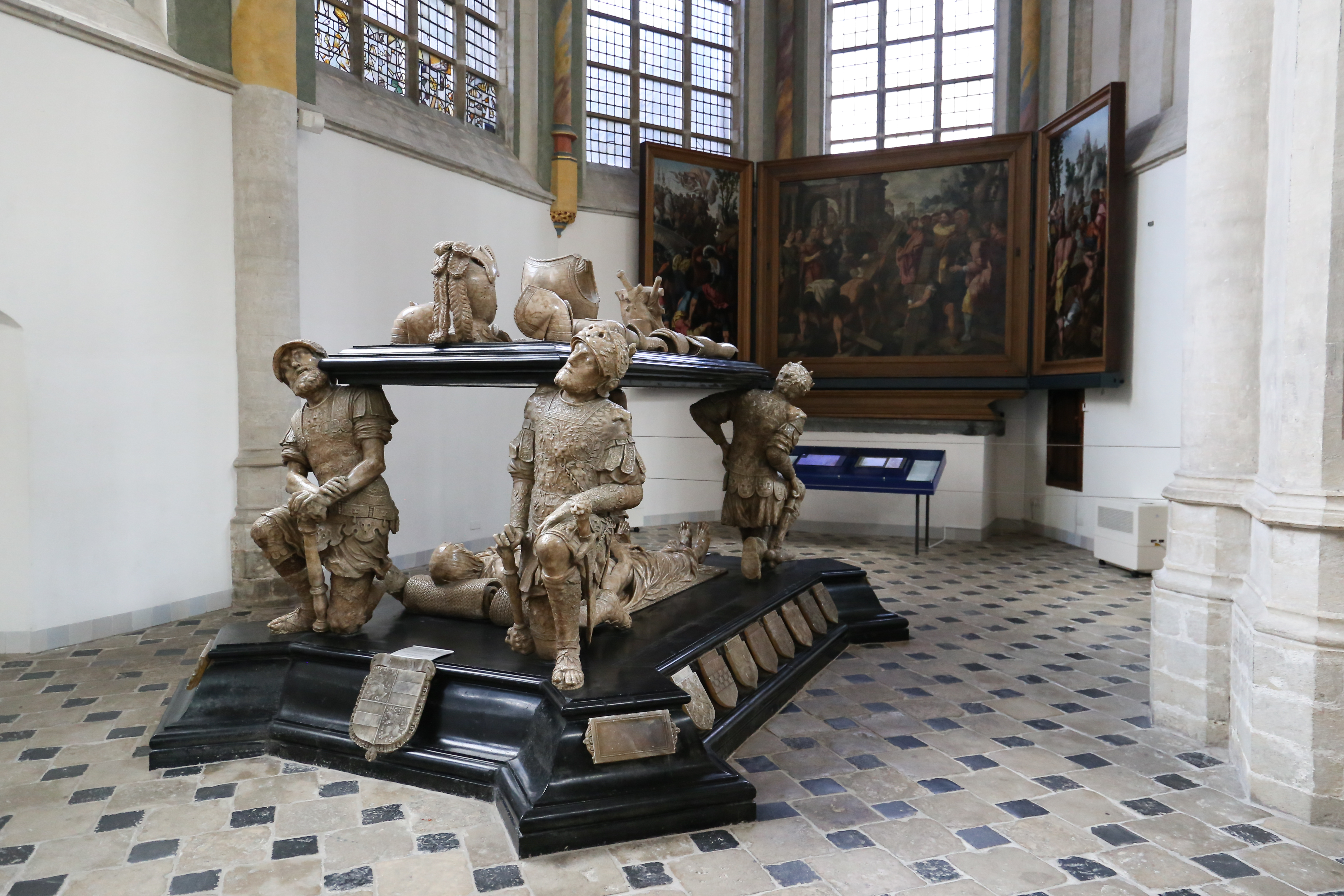 Interieur Grote of Onze-Lieve-Vrouwekerk in Breda